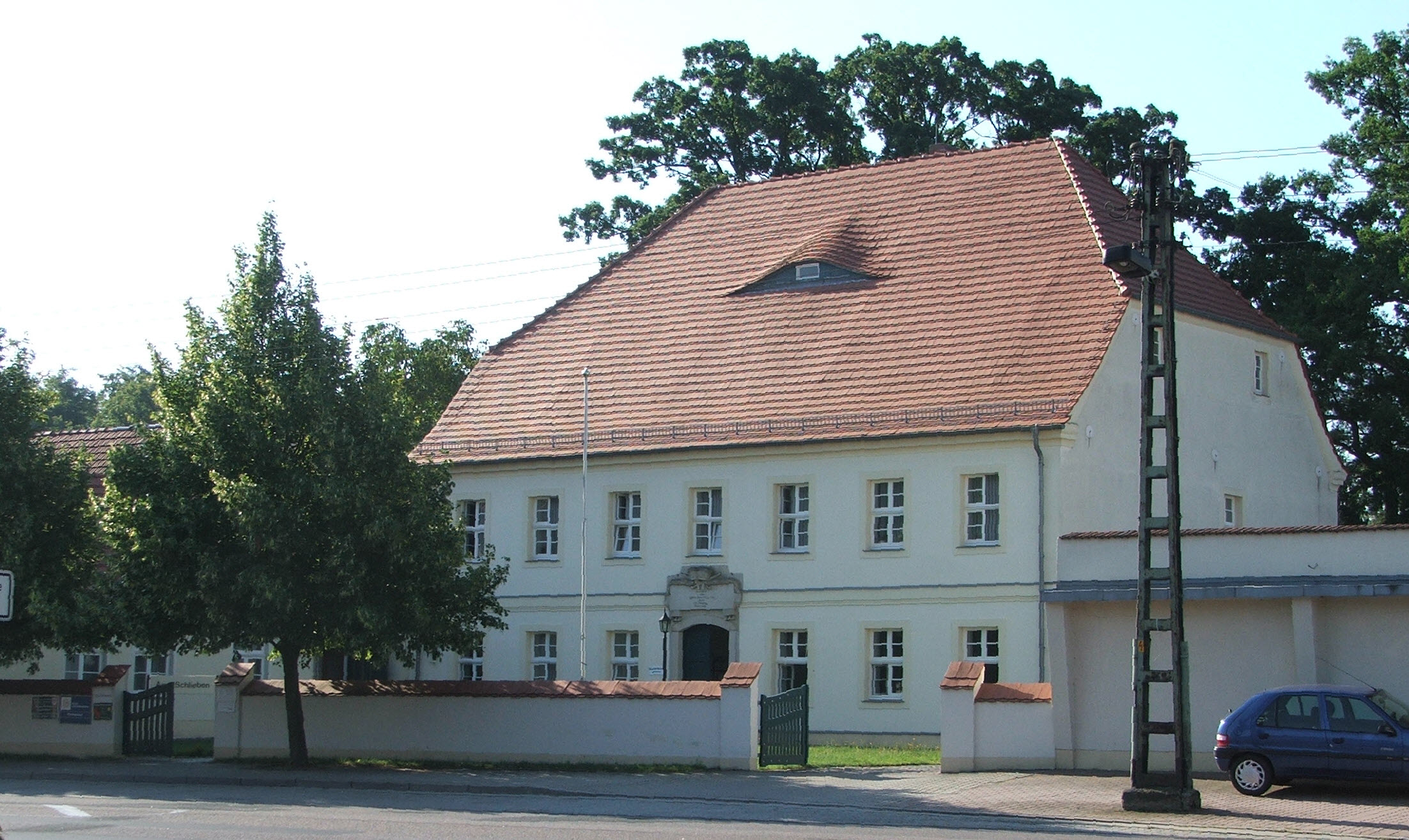 Amt in Schlieben